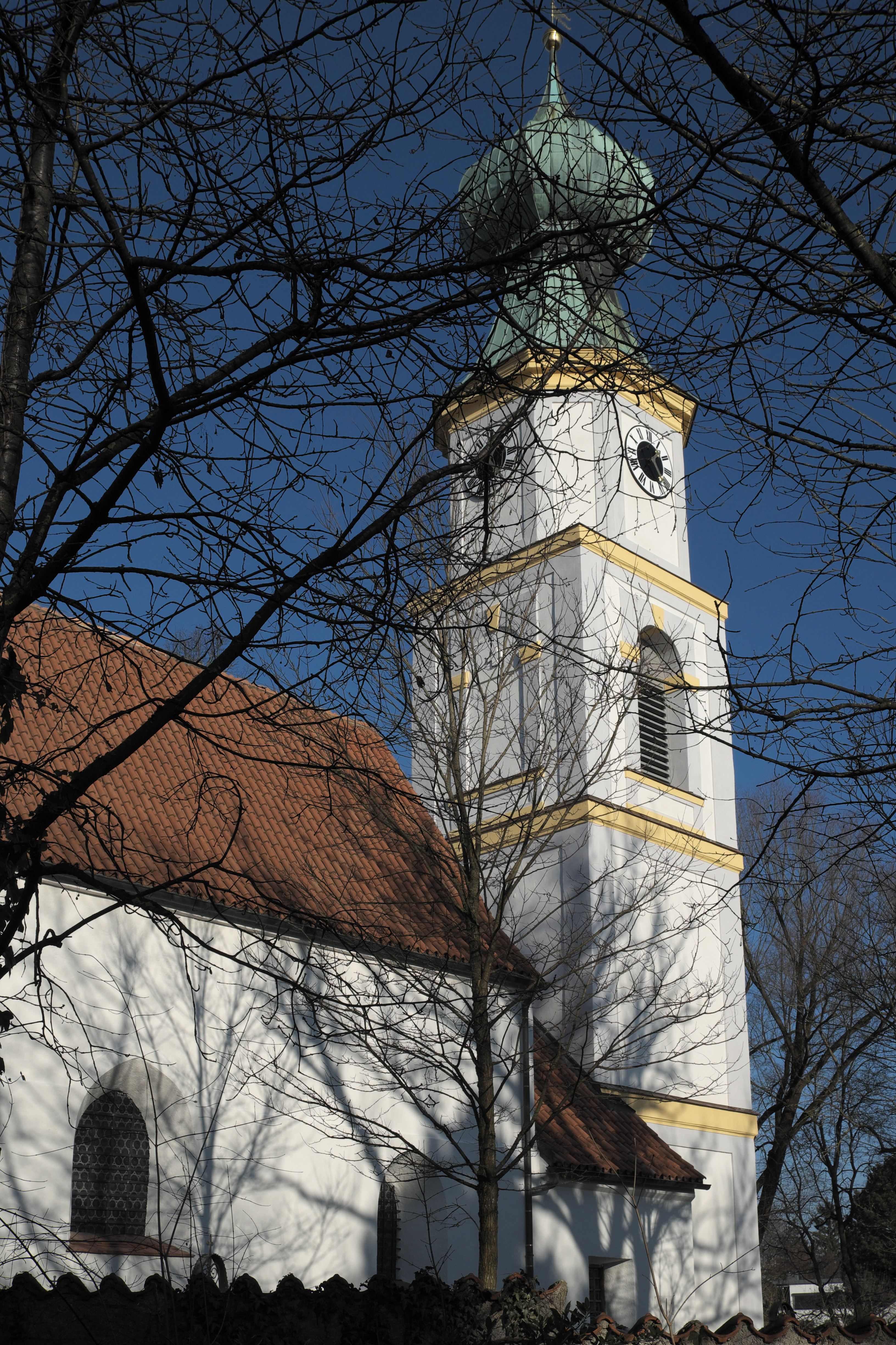 Alte katholische Pfarrkirche St. Georg in Obermenzing im Stadtbezirk Pasing-Obermenzing in München (Bayern/Deutschland)